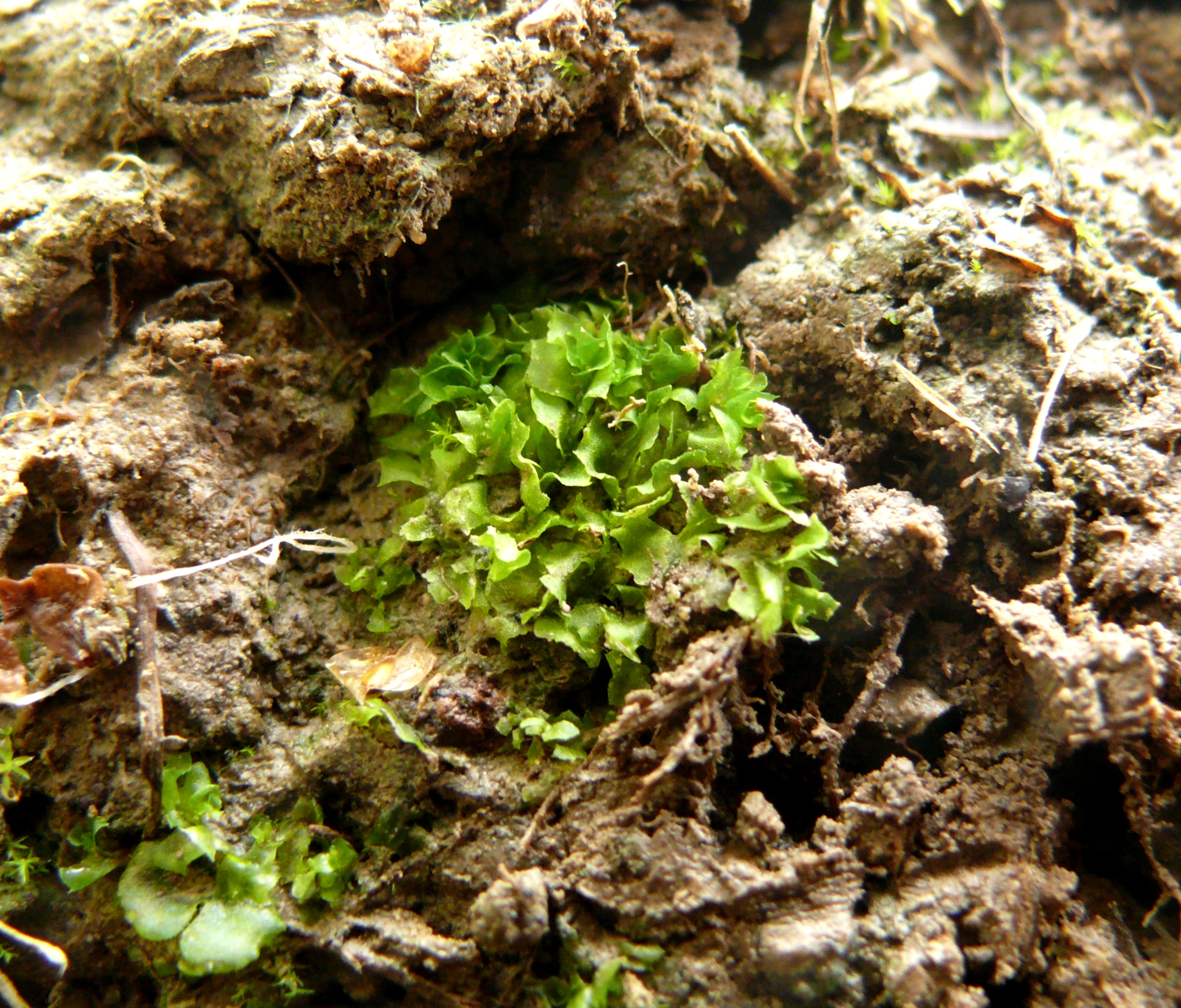 Fossombronia wondraczekii, Schwäbisch-Fränkische Waldberge, Deutschland